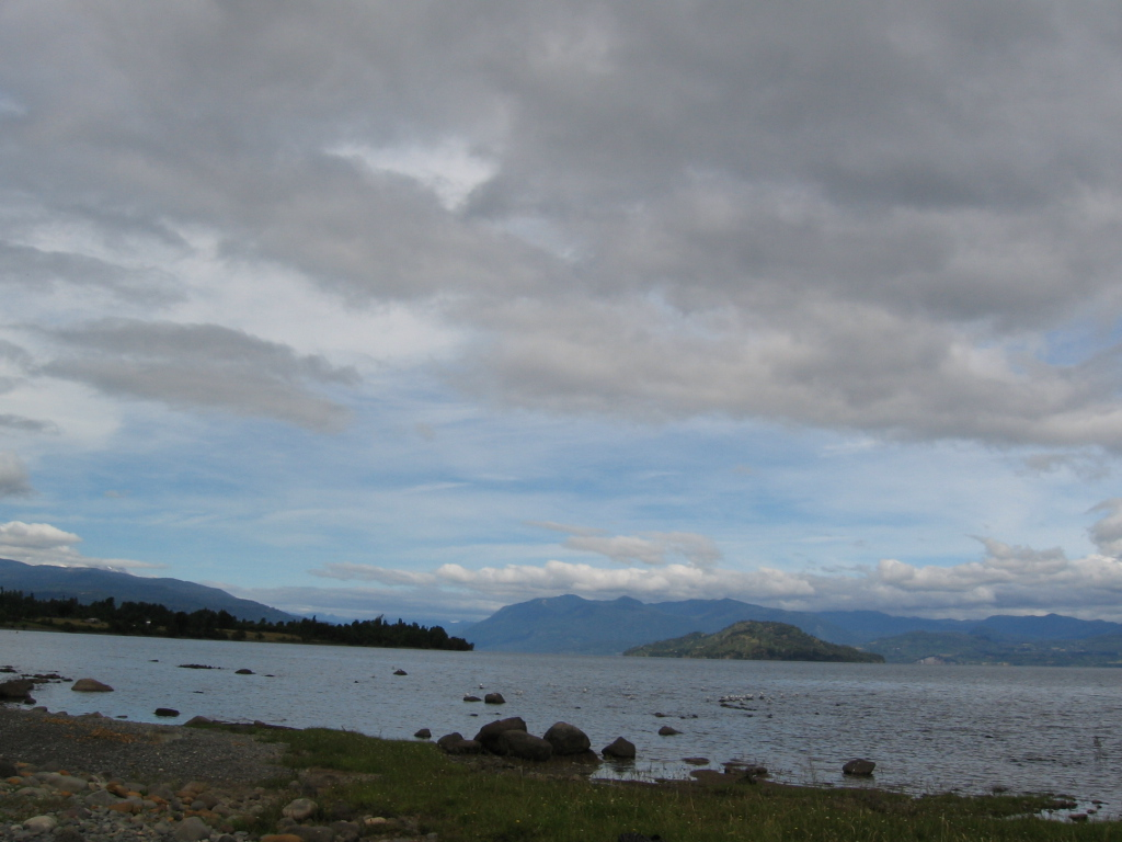 Vista del Lago Puyehue desde la localidad de Mantilhue (X Ragión - Chile)